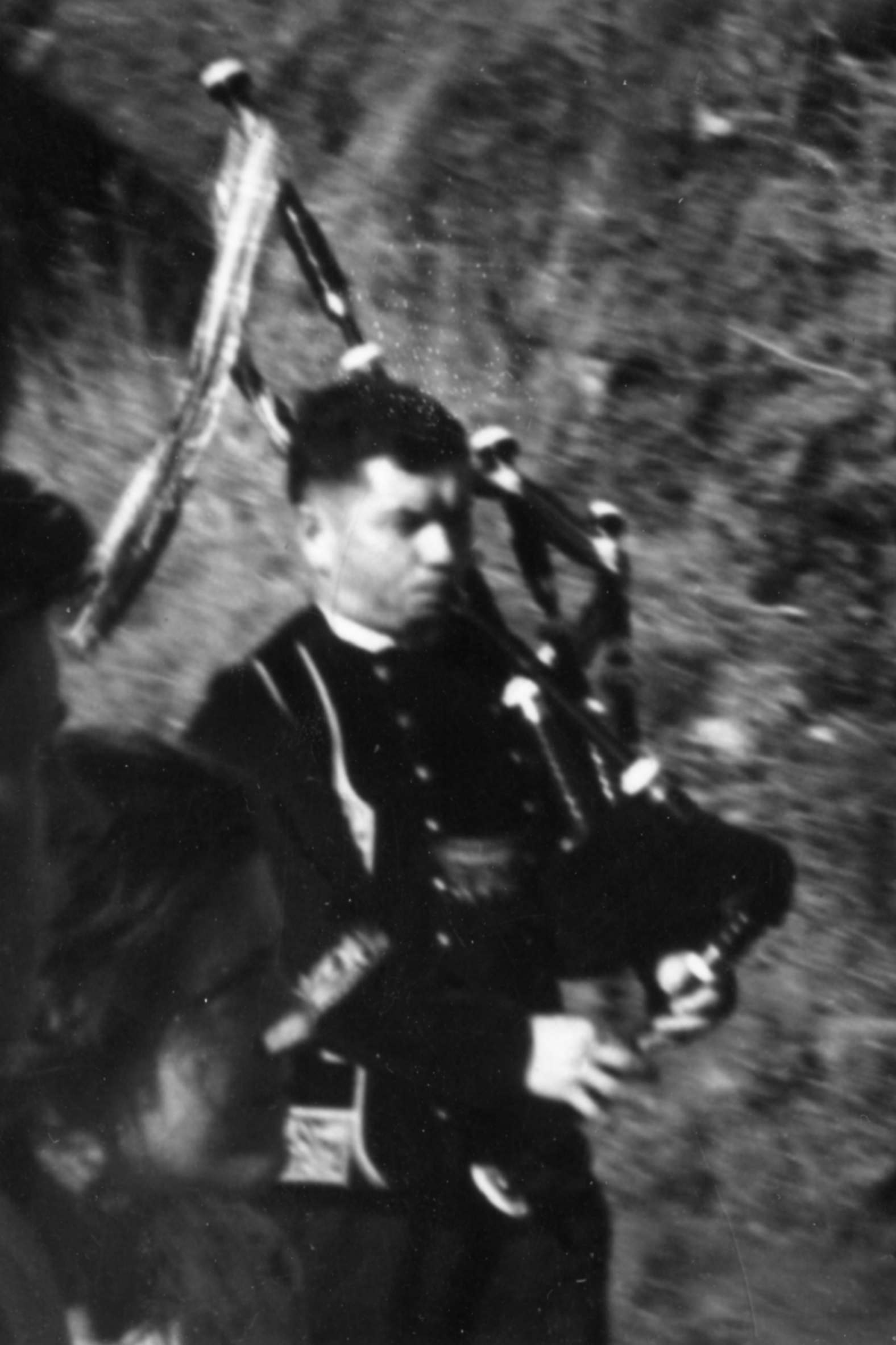 Jakez Konan nevez deuet en-dro da Vreizh e Landreger e 1948.